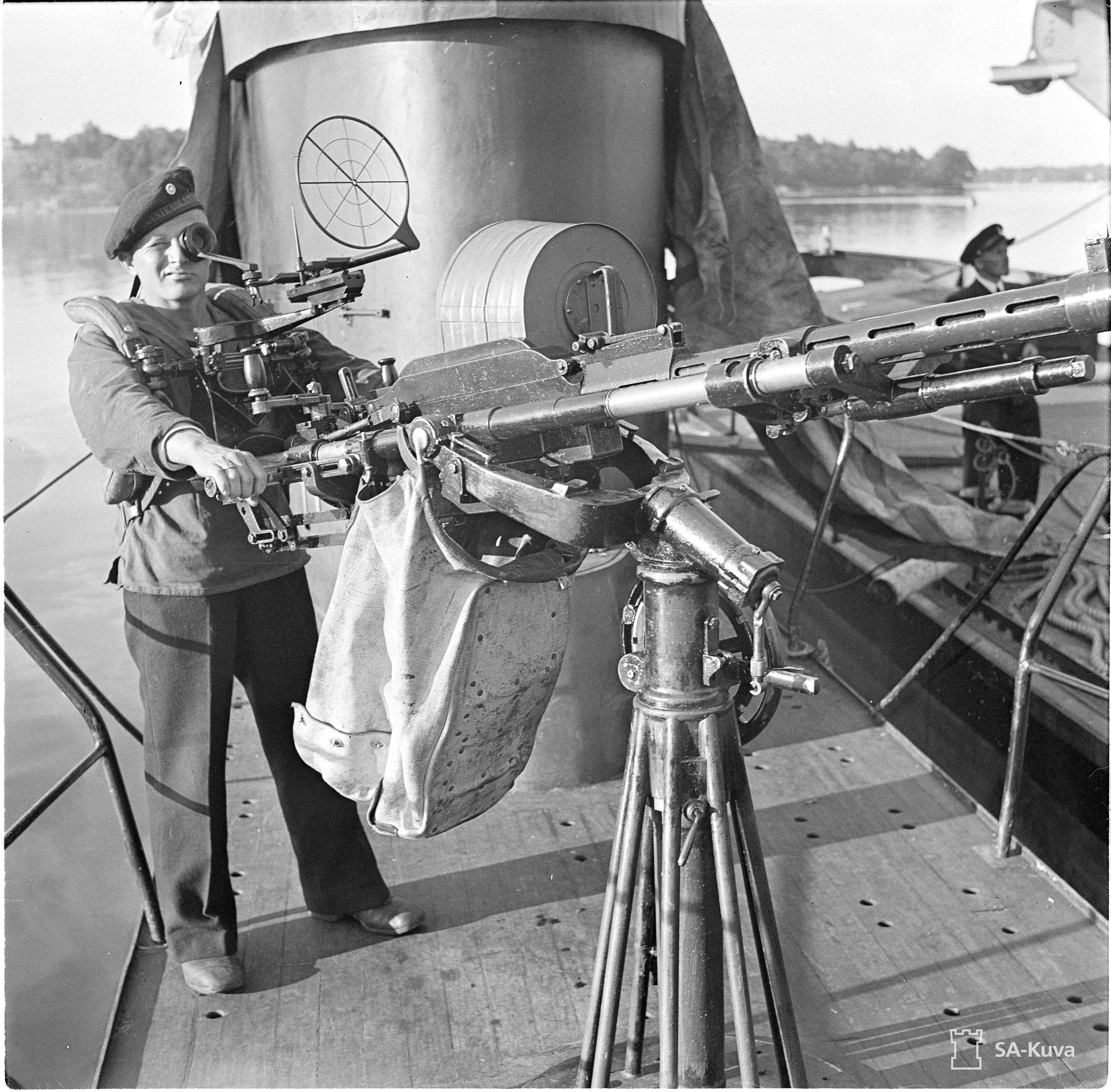 Tykkimies Vesikon kannella.; Tykkimies Vesikon kannella. Kannella 20 mm:n Madsen-ilmatorjuntatykki.